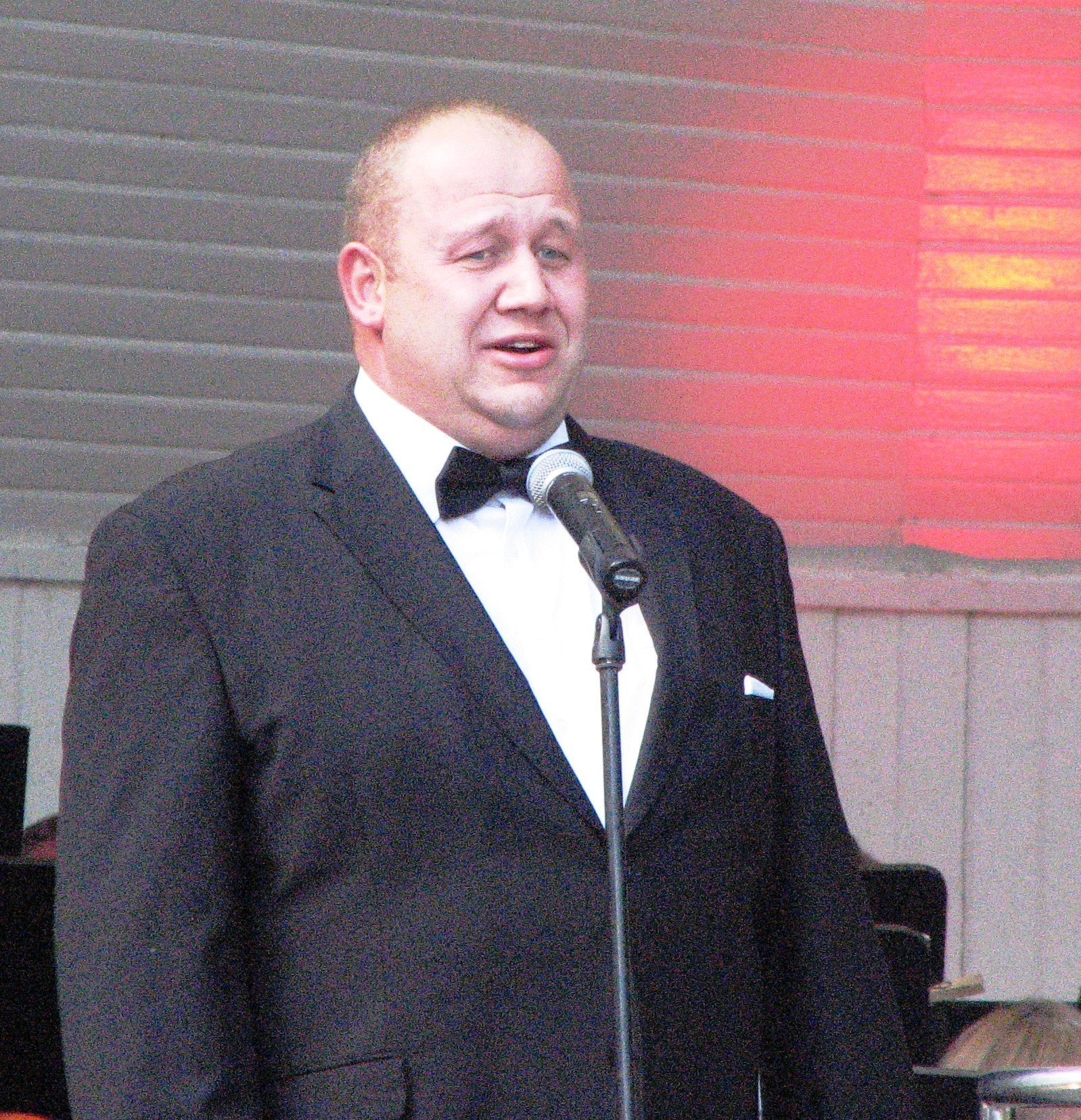 Koit Soasepp esinemas Saaremaa Ooperipäevade avakontserdil "Kuressaare 450"